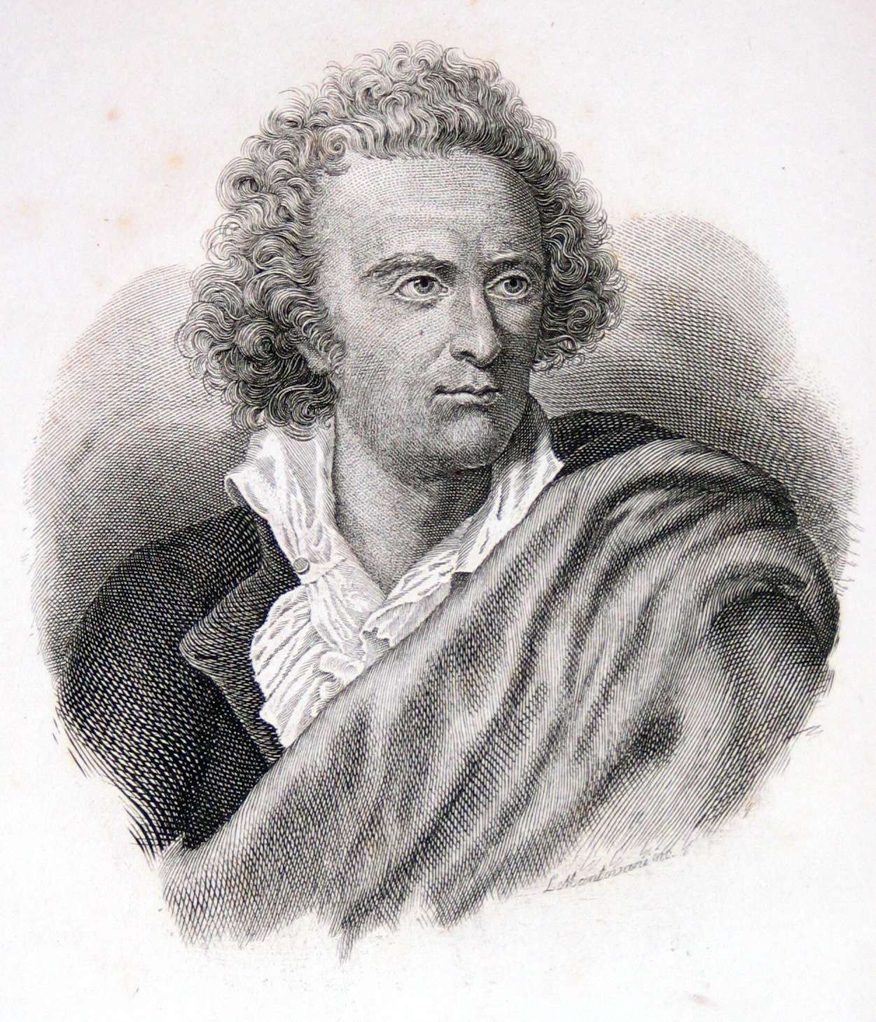 Vittorio Alfieri, incisione da la "Vita scitta da esso", Milano 1848